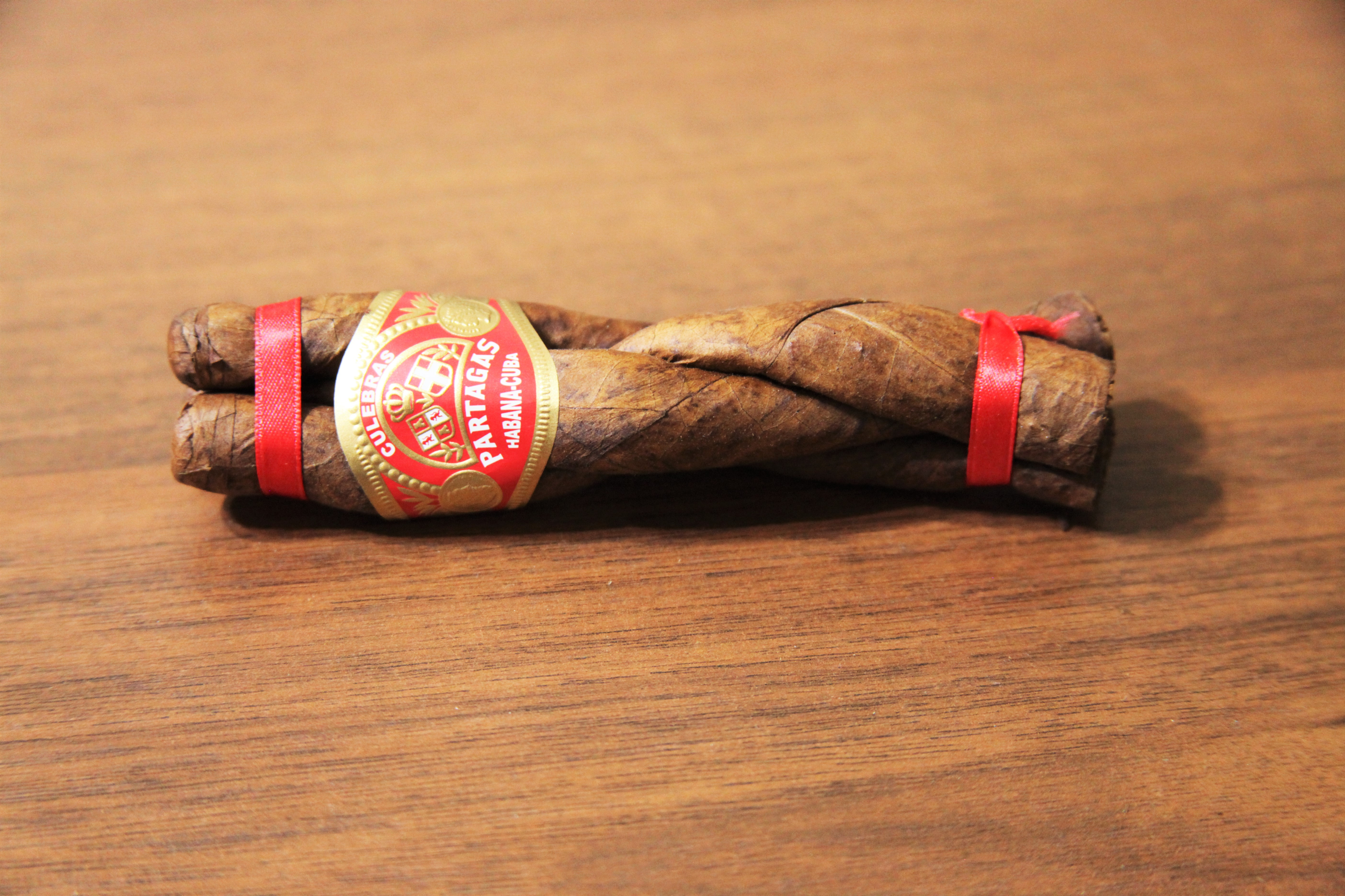 Paragas Culebras